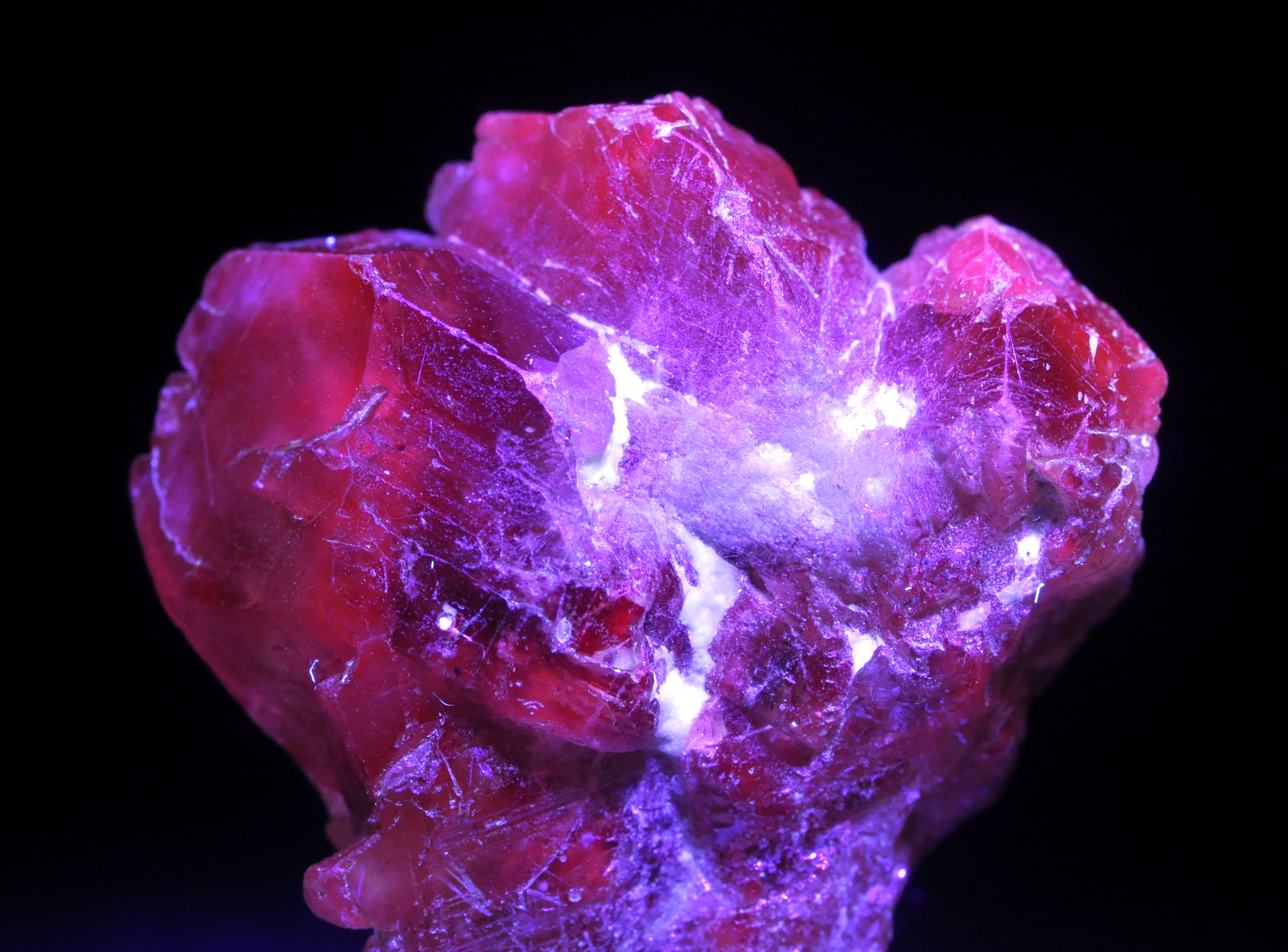 rayonnement d'un cristal (2,8 cm) de chrysoberyl var. alexandrite sous UV